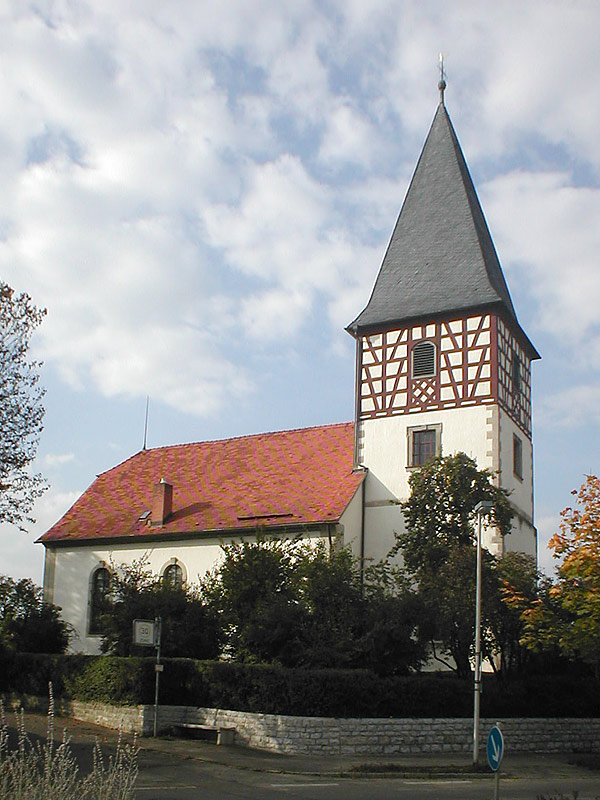 Kirche St. Juliana in Aspach-Großaspach, Baden-Württemberg, Deutschland